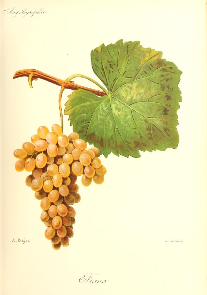 Grappe de Fiano par Viala et Vermorel